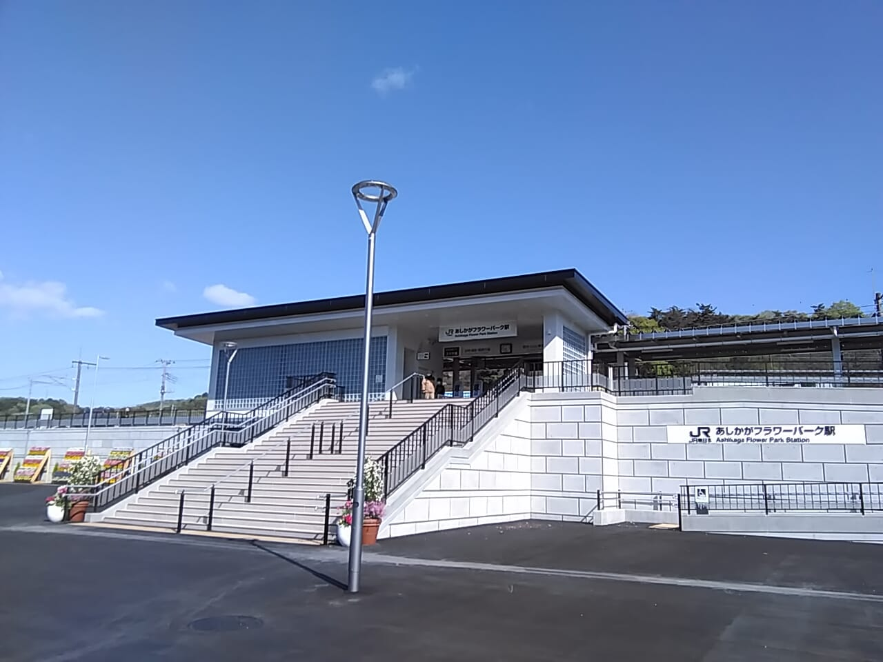 あしかがフラワーパーク駅正面